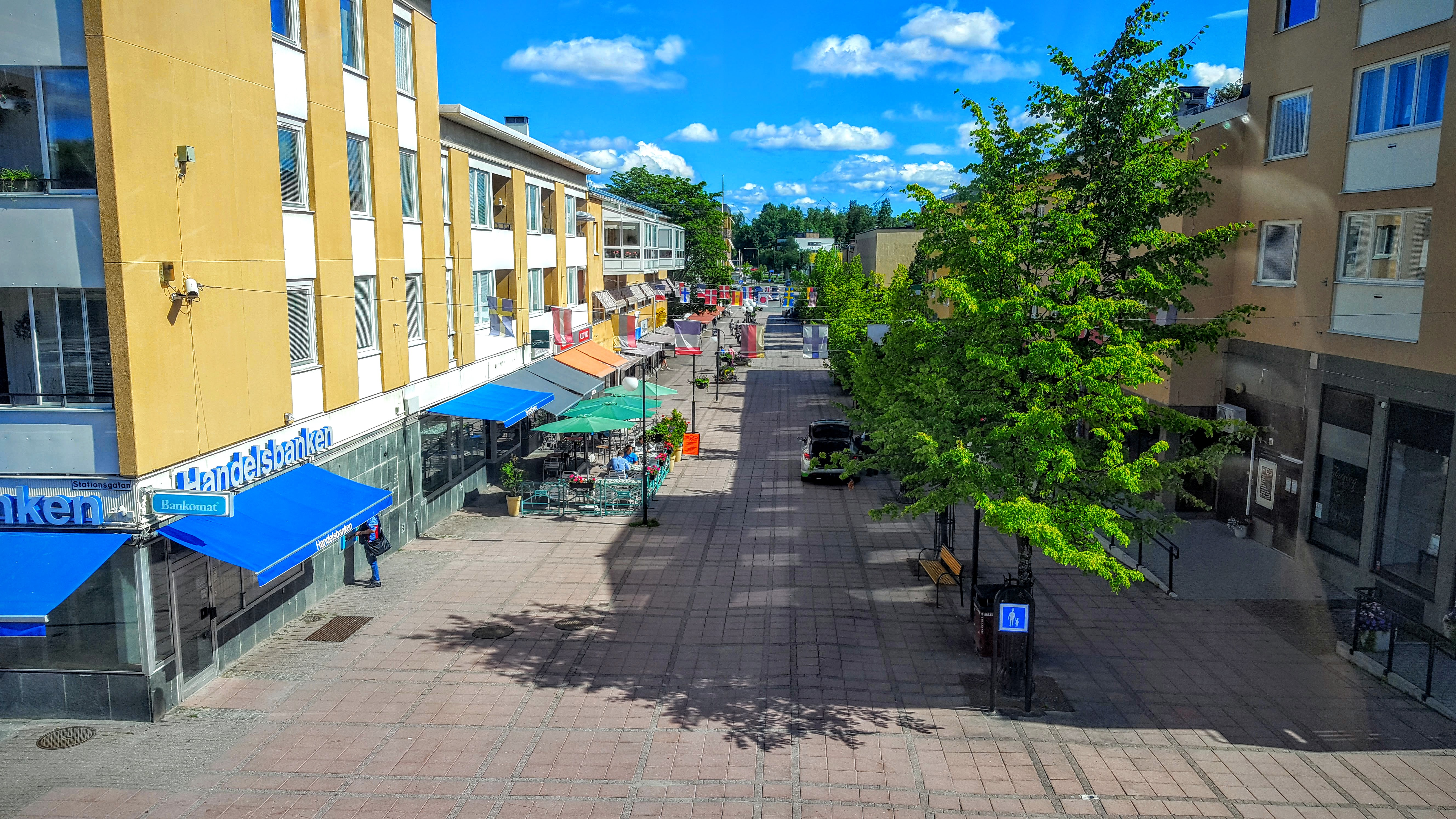 Kramfors, Sweden